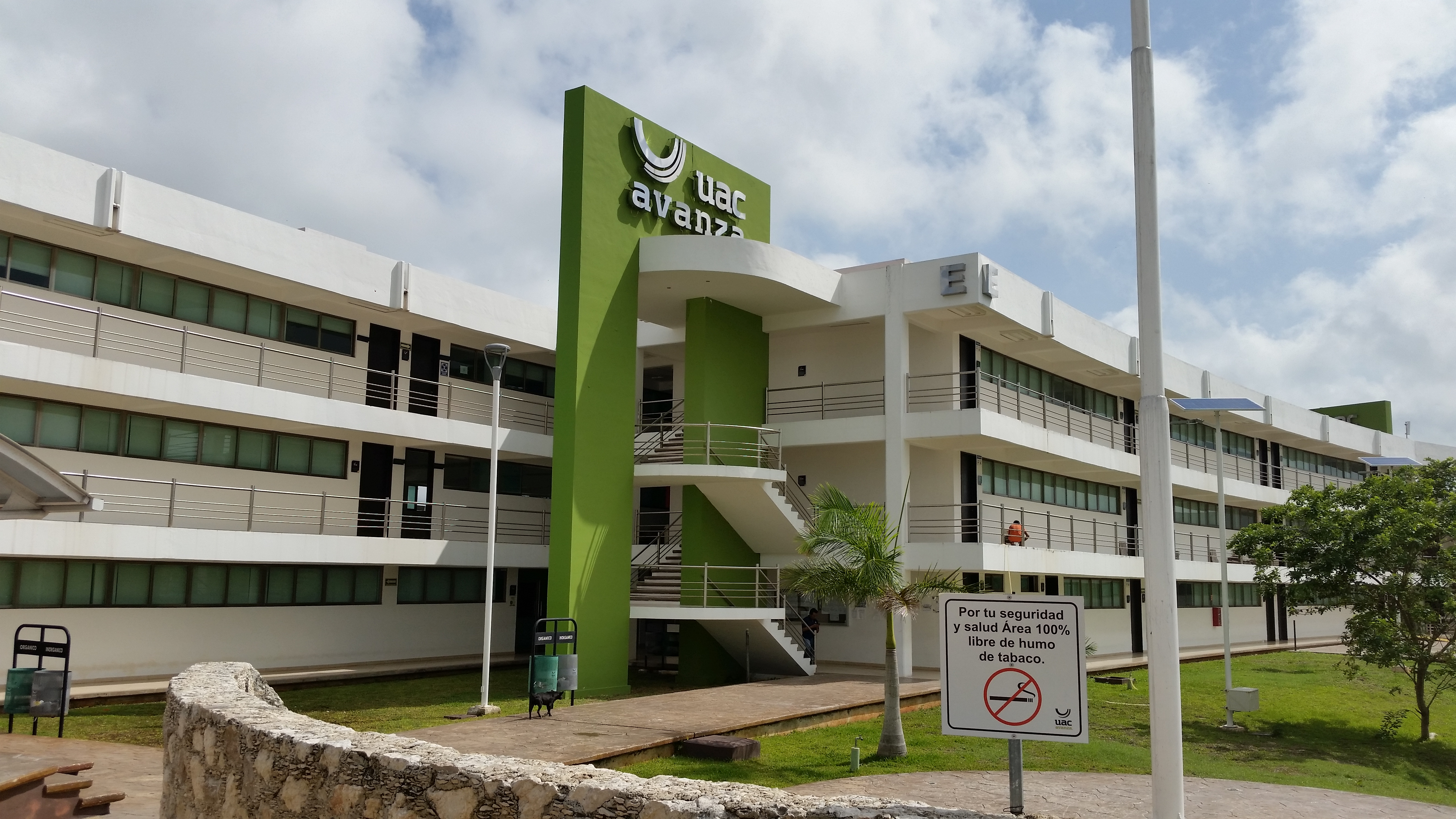 Campus V